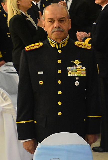 El por entonces General de División Ricardo Luis Cundom durante la Cena de Camaradería de las Fuerzas Armadas 2015.